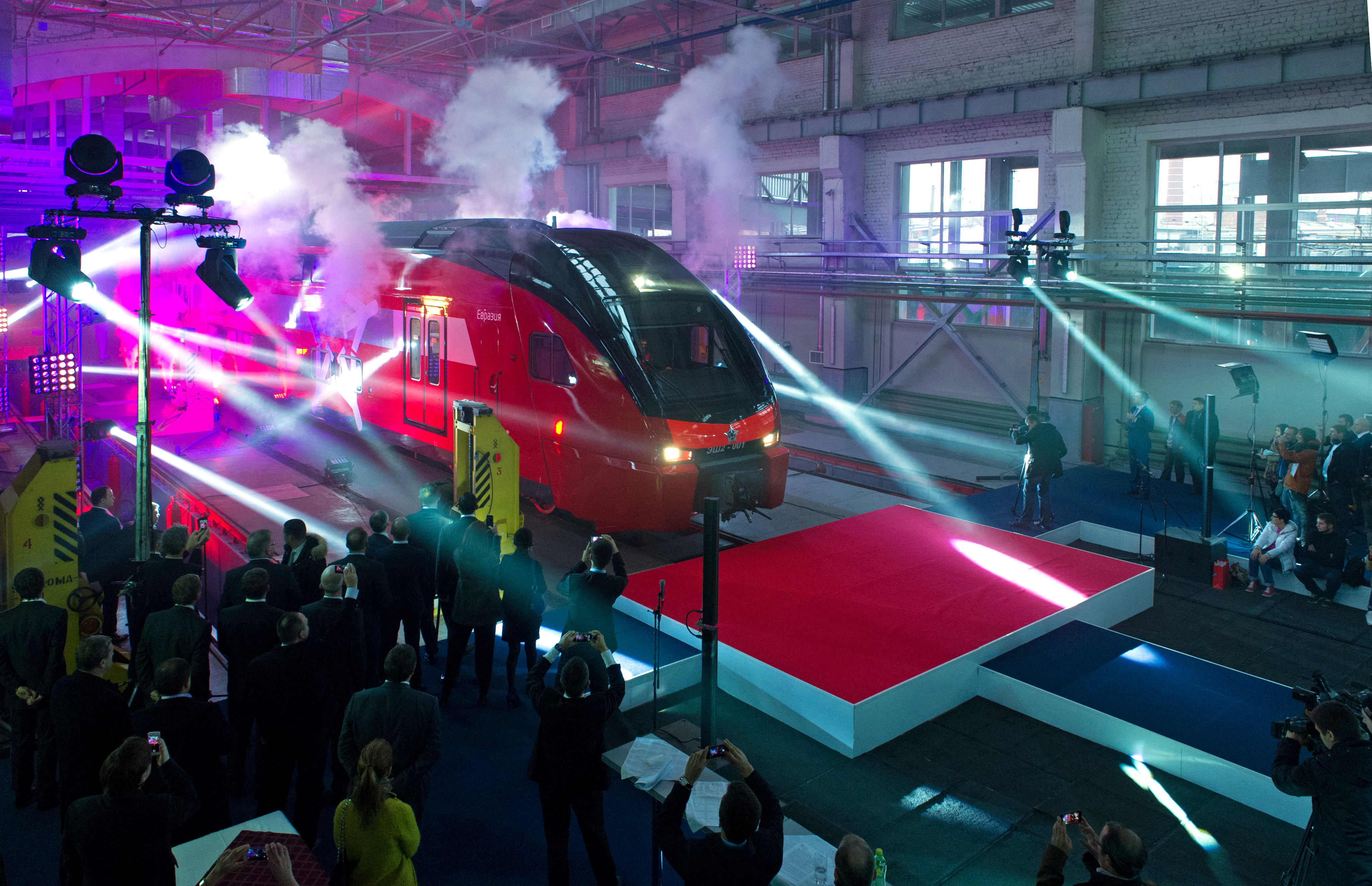 Электропоезд ЭШ2-001 в депо им. Ильича во время презентации мэру Москвы